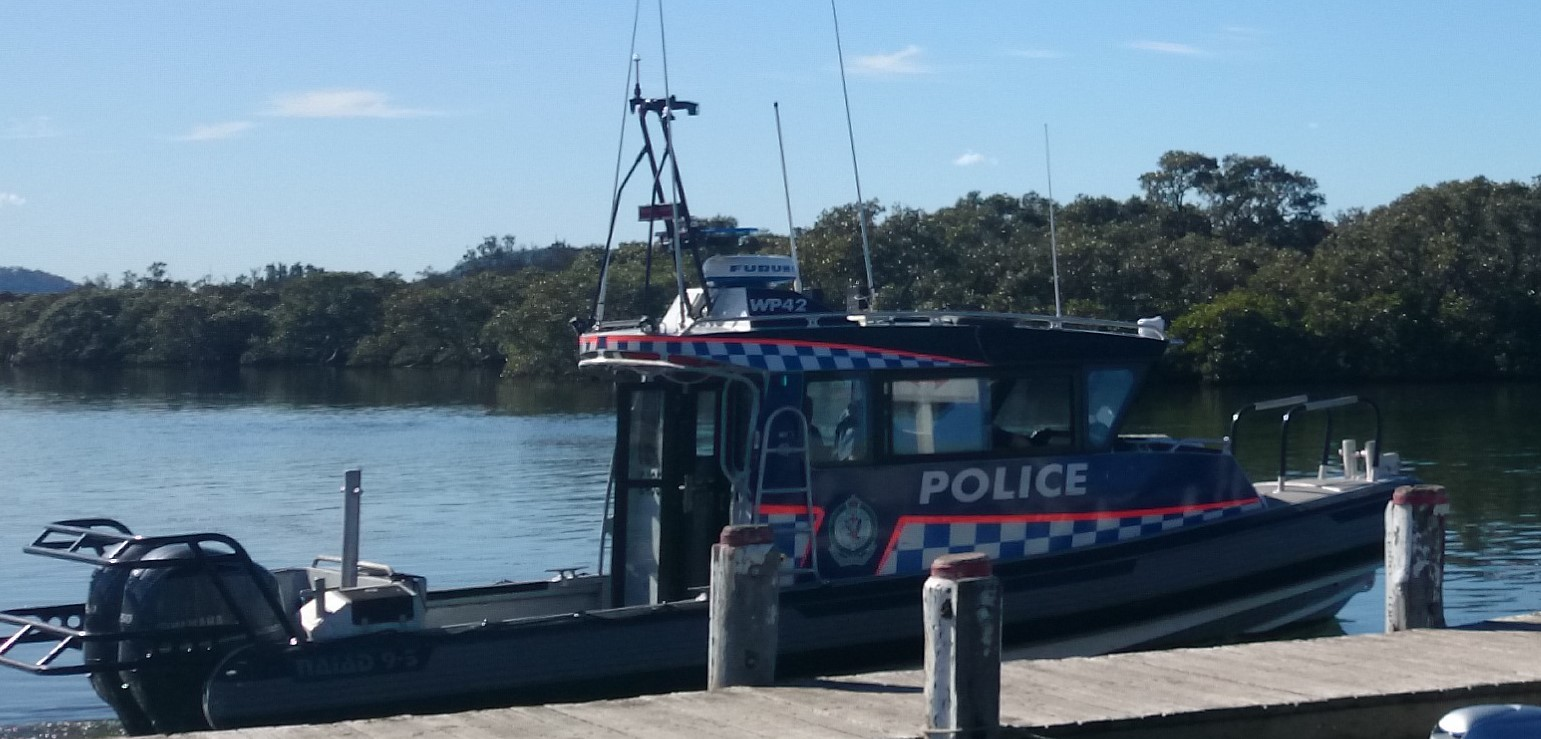 NSW Police Boat